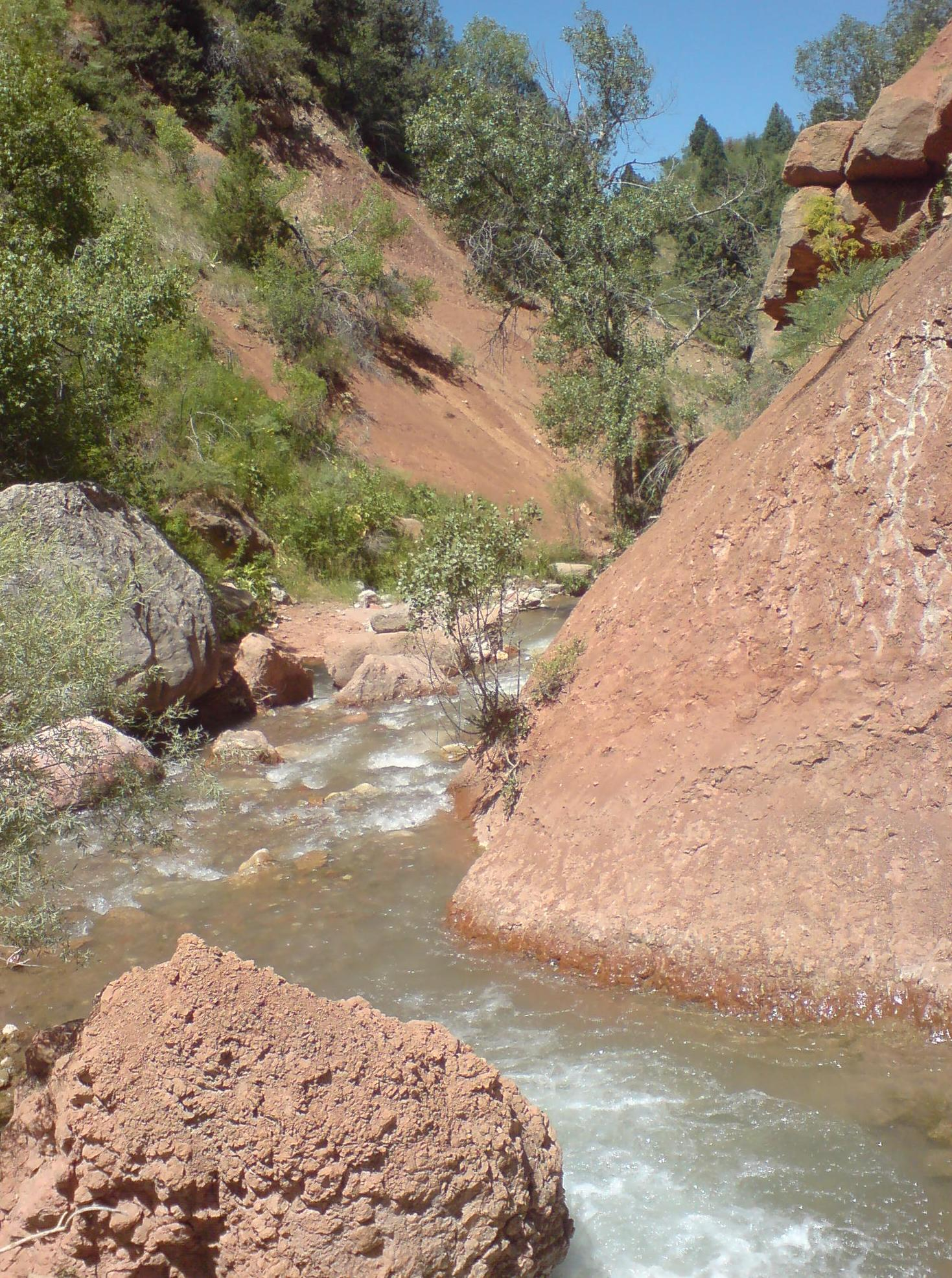 Река Бельдерсай в ущелье близ впадения Мраморного ручья